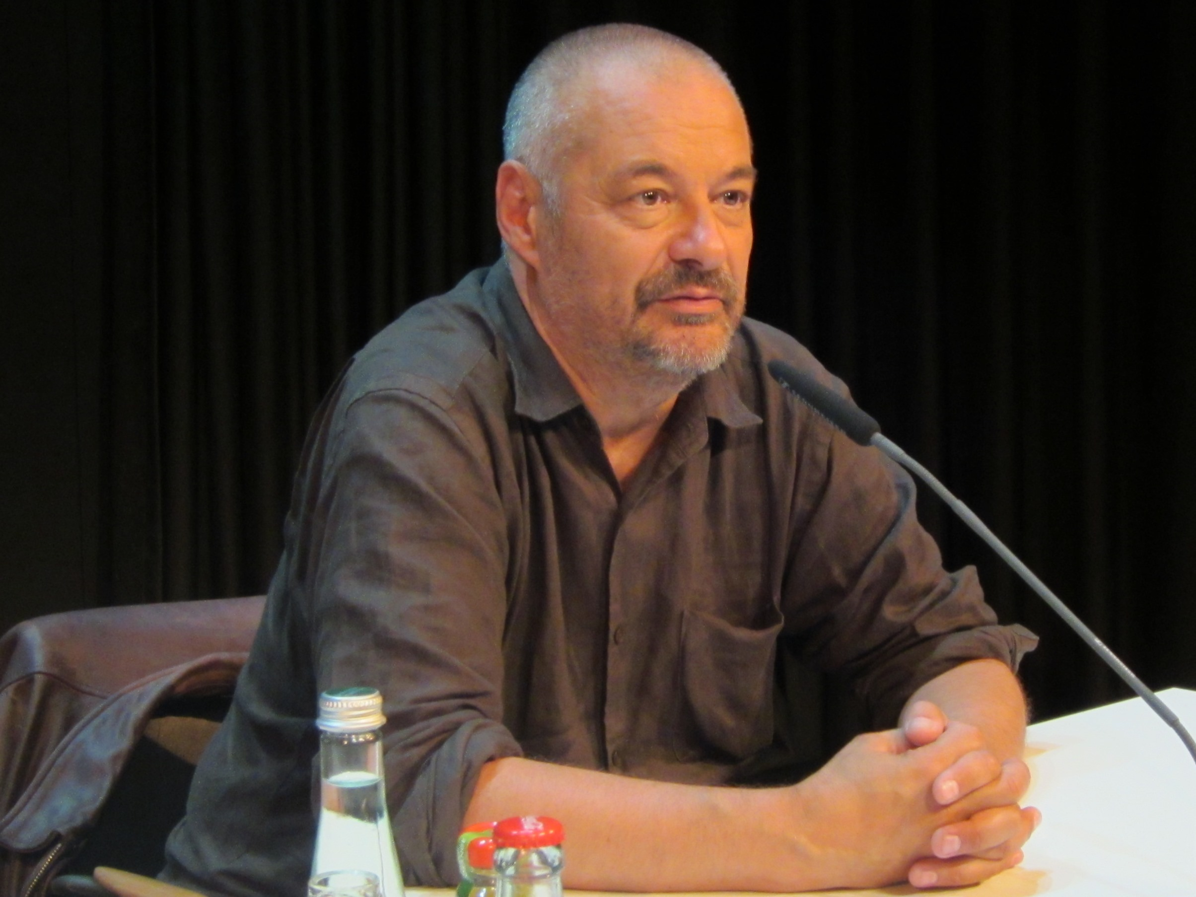 Regisseur Jean-Pierre Jeunet auf dem Filmfest München 2014.